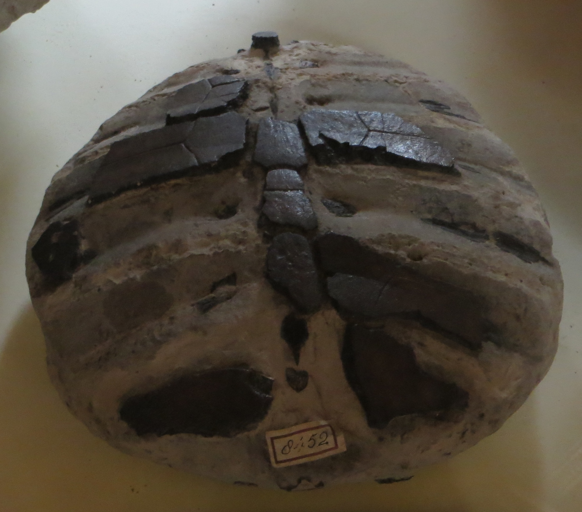 Fossil- Took the picture at Teylers Museum, Haarlem